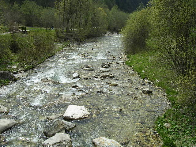 Foto scattata da me medesimo il 25.04.2006 a Mezzano (TN), in loc. Sorive. Vista verso N.